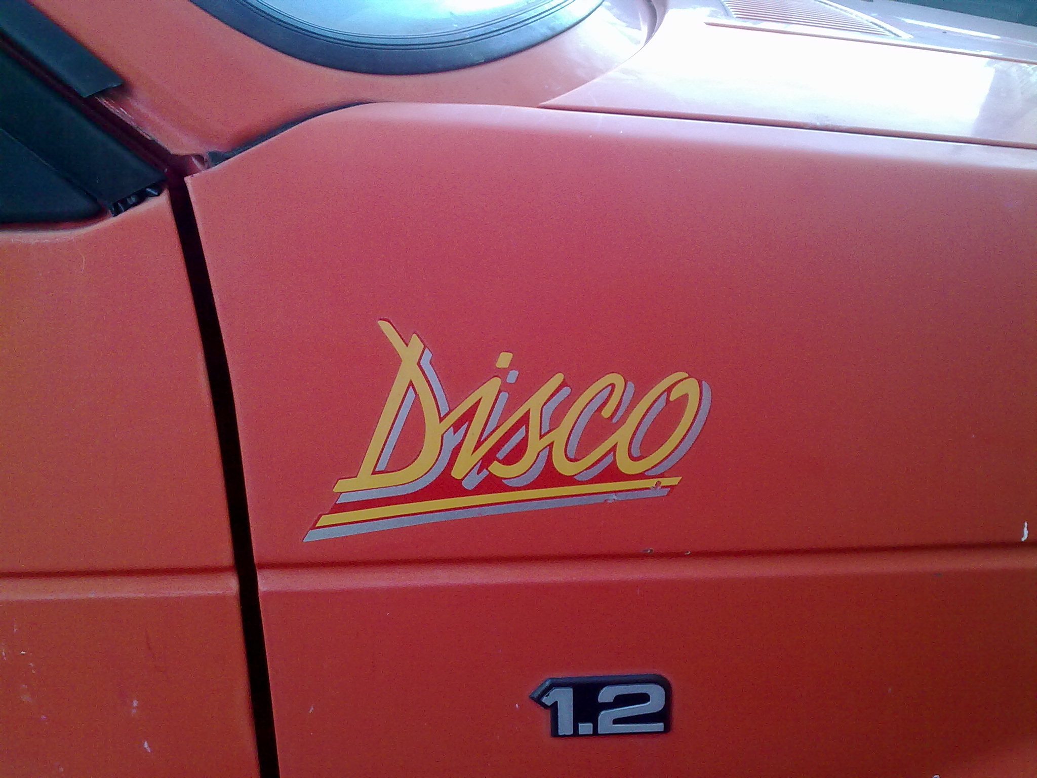 Logotipo que tiene esta version